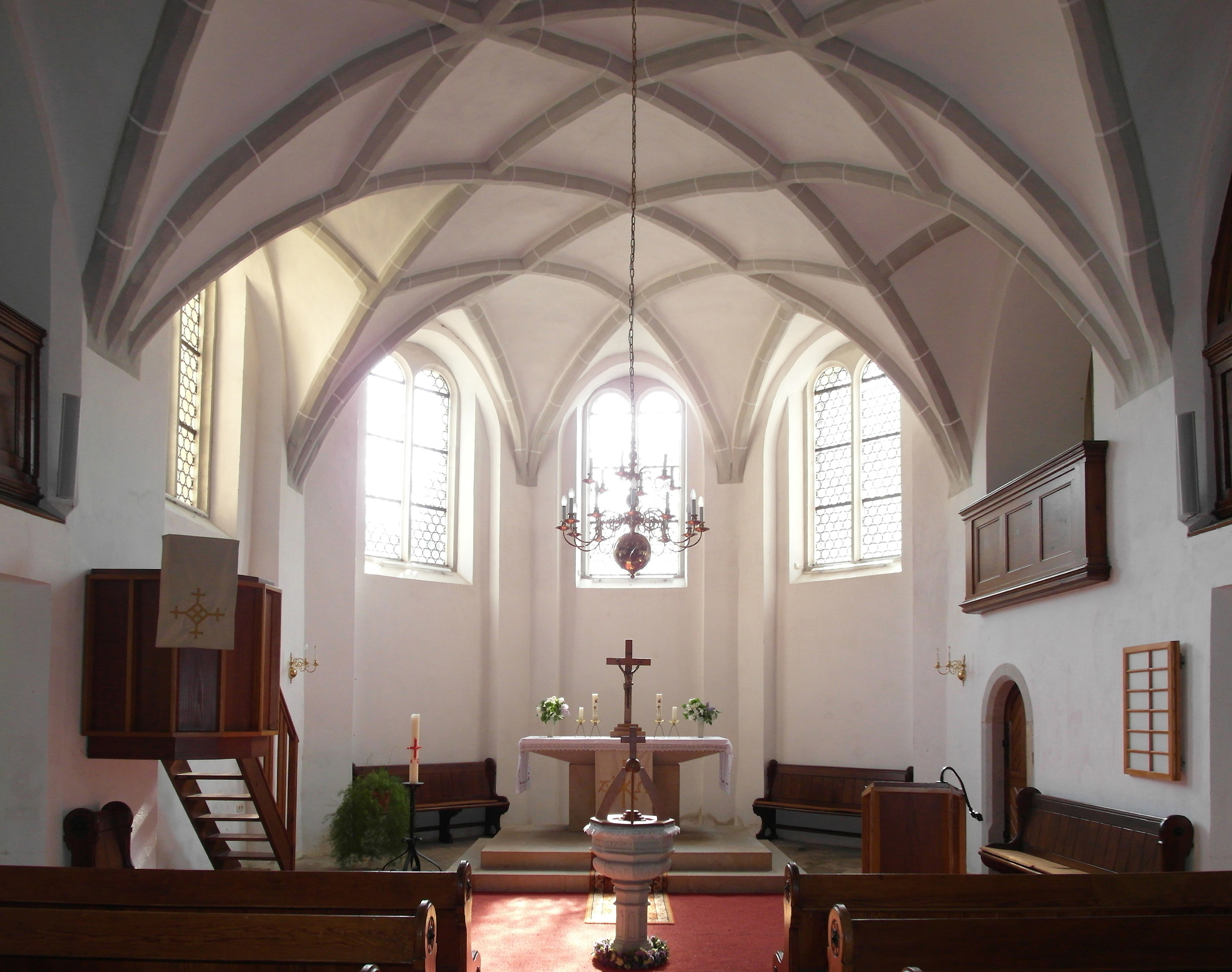 19.05.2016 01612 Glaubitz: Kirche (GMP: 51.316957,13.382074), Kirchgasse. 1319 wird erstmals eine Kirche erwähnt. Die heutige Kirche entstand nach der Reformation in der Zeit von 1586 bis 1589 - damals noch ohne Turm. Der Turm entstand im Jahr 1741. 1795 wurde der Kirchenraum umgestaltet. Ein Kanzelaltar mit Sakristei u. Emporen wurden eingebaut. Bei einer weiteren Erneuerung 1893 wurde der Kanzelaltar durch einen Steinaltar mit Holzaufsatz ersetzt, die Sakristei mit der darüberliegenden Loge angebaut und die Orgel und der Taufstein angeschafft. 1965 umfassende Erneuerung d. Kircheninneren unter Leitung des Dresdner Architekten Christian Möller. Die Chorfenster wurden wieder mit Sandsteingewänden geteilt und mit Butzenscheiben verglast, ein neuer Altar und d. Kanzel wurden angeschafft. [SAM6042.JPG]20160519310DR.JPG(c)Blobelt